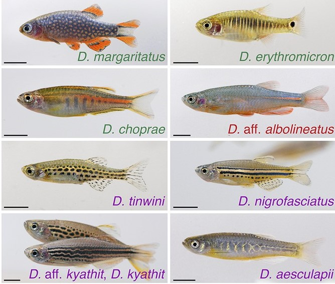 Spesies yang memiliki kekerabatan dekat dengan ikan zebra